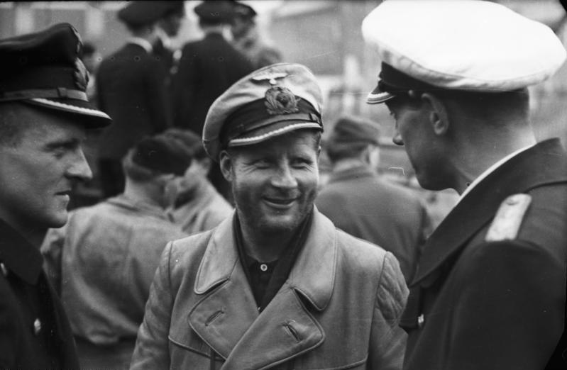 Bild 183: Im besetzten Gebiet : (Frankreich) Ein U-Boot kehrt von erfolgreicher Feindfahrt zurück. Kapitänleutnant Lehmann Willenbrock meldet sein Boot von erfolgreicher Feindfahrt zurück. PK - Aufnahme: Kriegsberichter Schwich (Sch.) 7601-41 "Fr". "Fr.OKW" Mai 41